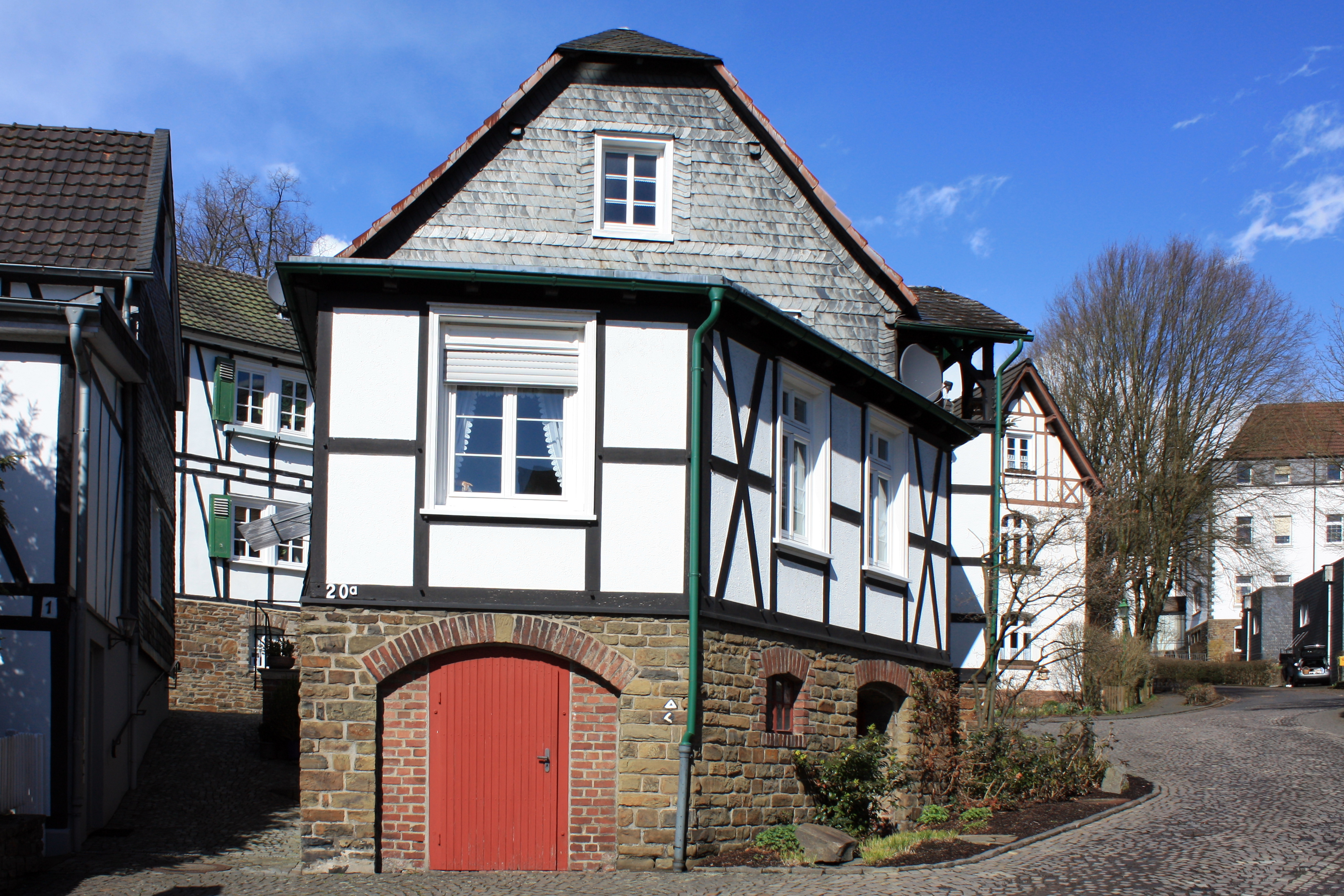 Morsbach, Kirchstraße 20. 2 geschossiges Fachwerkhaus mit 1 geschossigem Fachwerkanbau: E. 19.- A. 20 Jh. Baudenkmal der Gemeinde Morsbach auf der Grundlage des Denkmalschutzgesetzes Nordrhein-Westfalen (DSchG NRW). (IMG 5708)